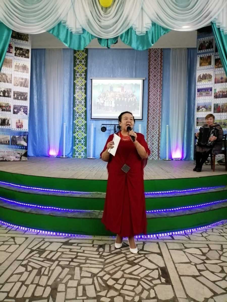 Яруллина М. А.